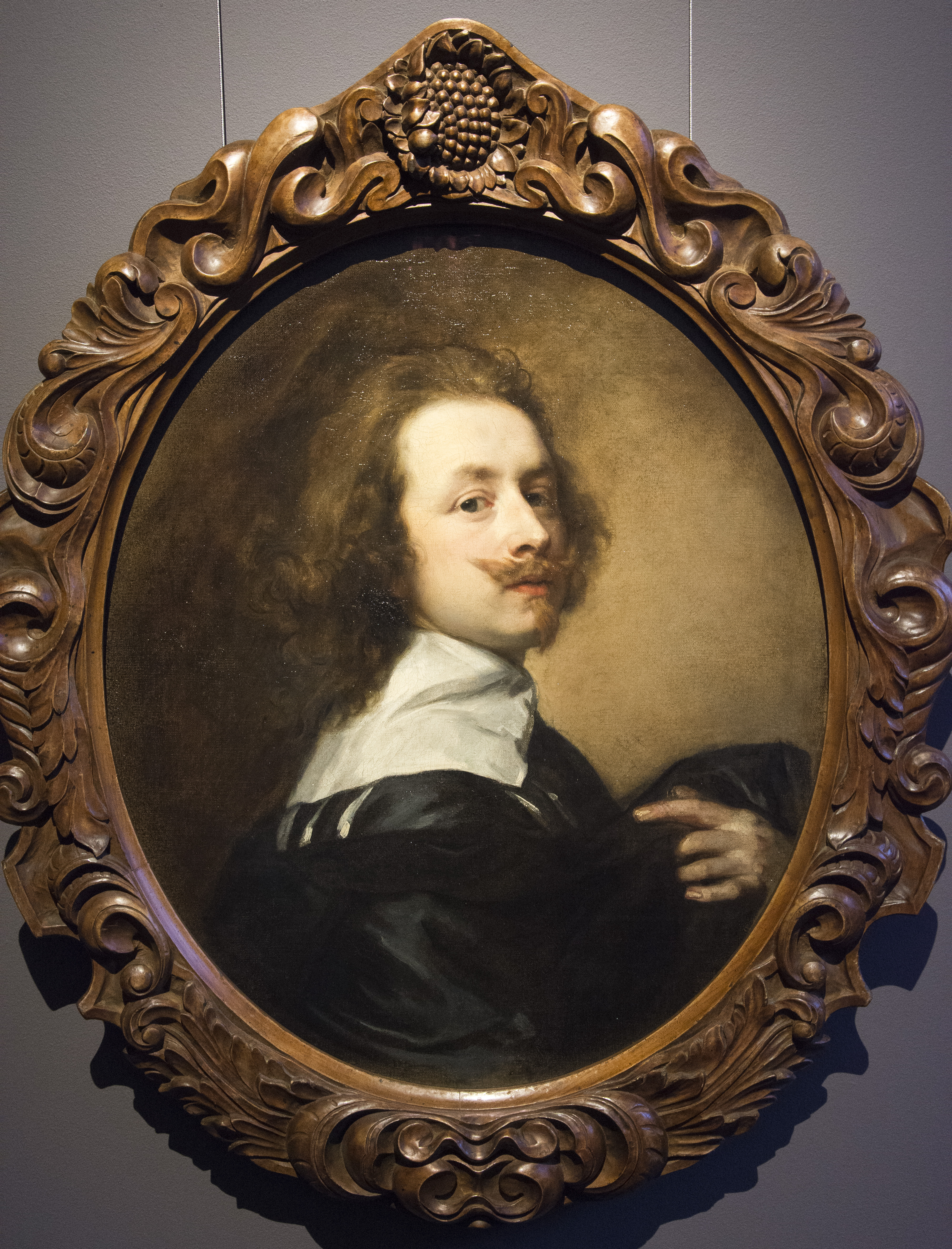 Zelfportret van Antoon van Dyck in het Rubenshuis te Antwerpen